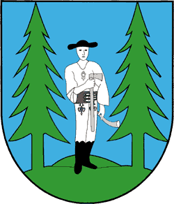 Herb wsi Kiczory (gmina Lipnica Wielka)